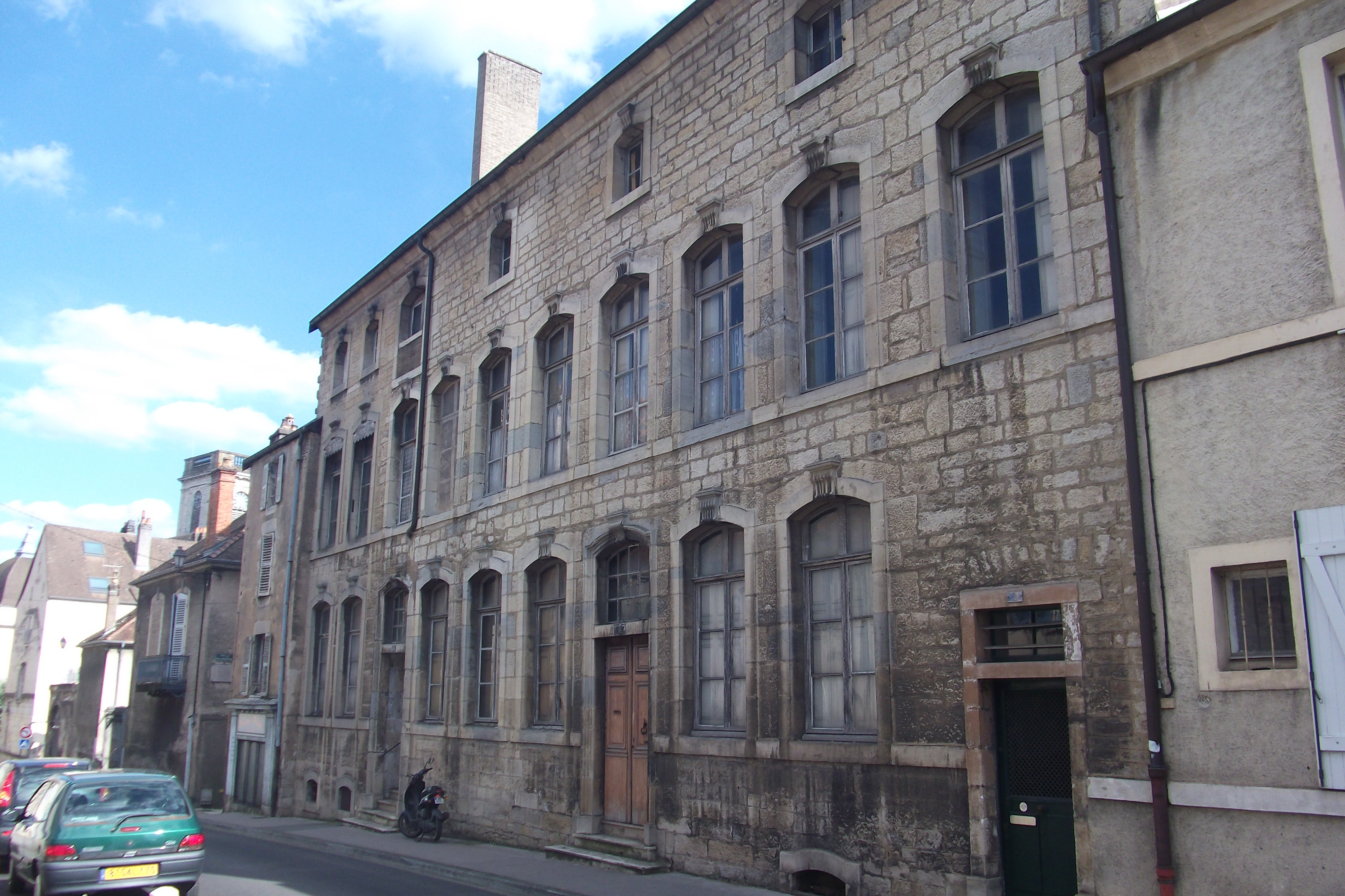 La maison Ebaudy de Rochetaillé de Vesoul (Haute-Saône, Franche-Comté)